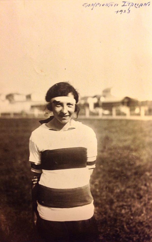 Maria Piantanida ai campionati italiani di atletica leggera del 1923 a Milano.